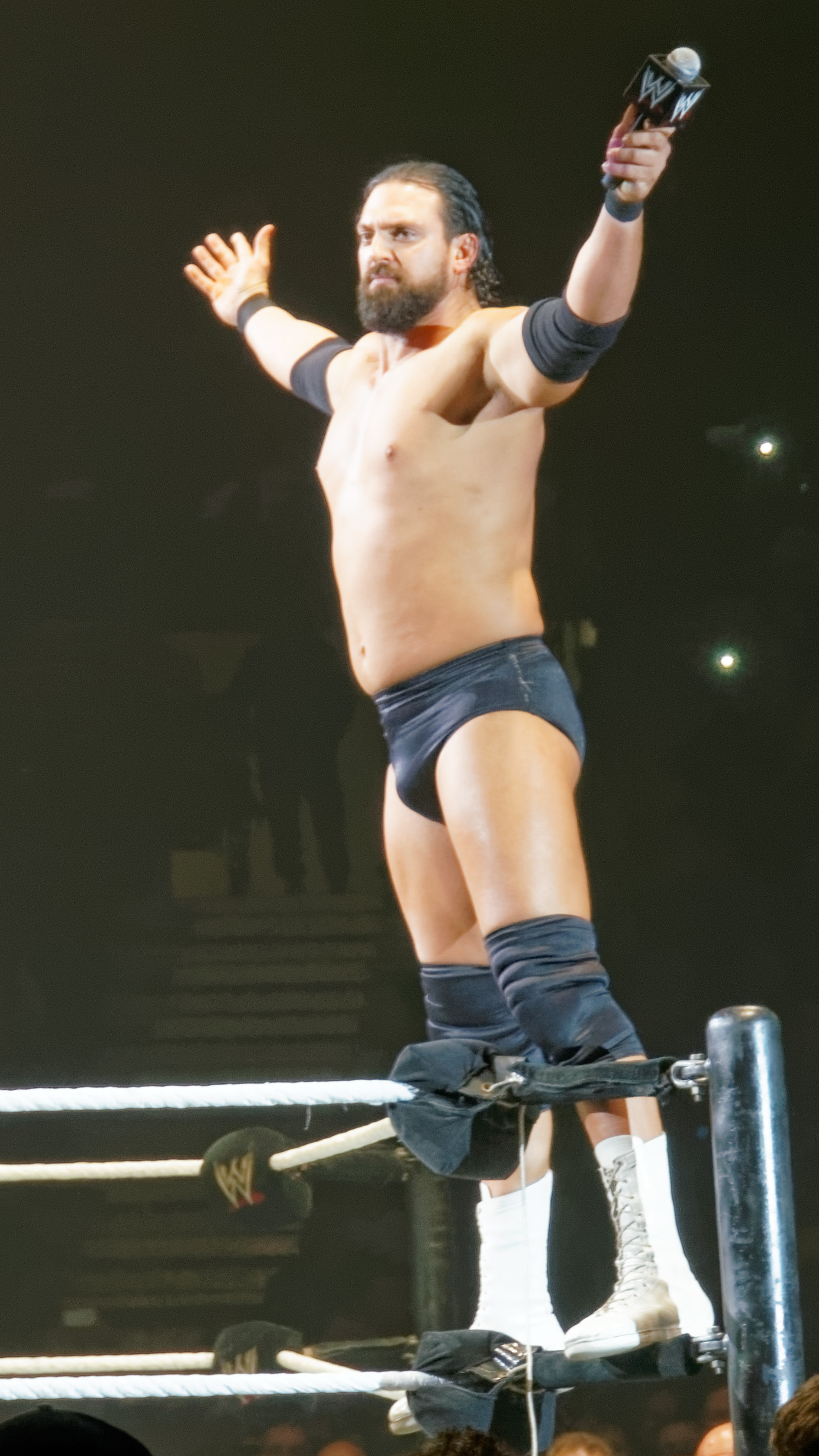 sandow